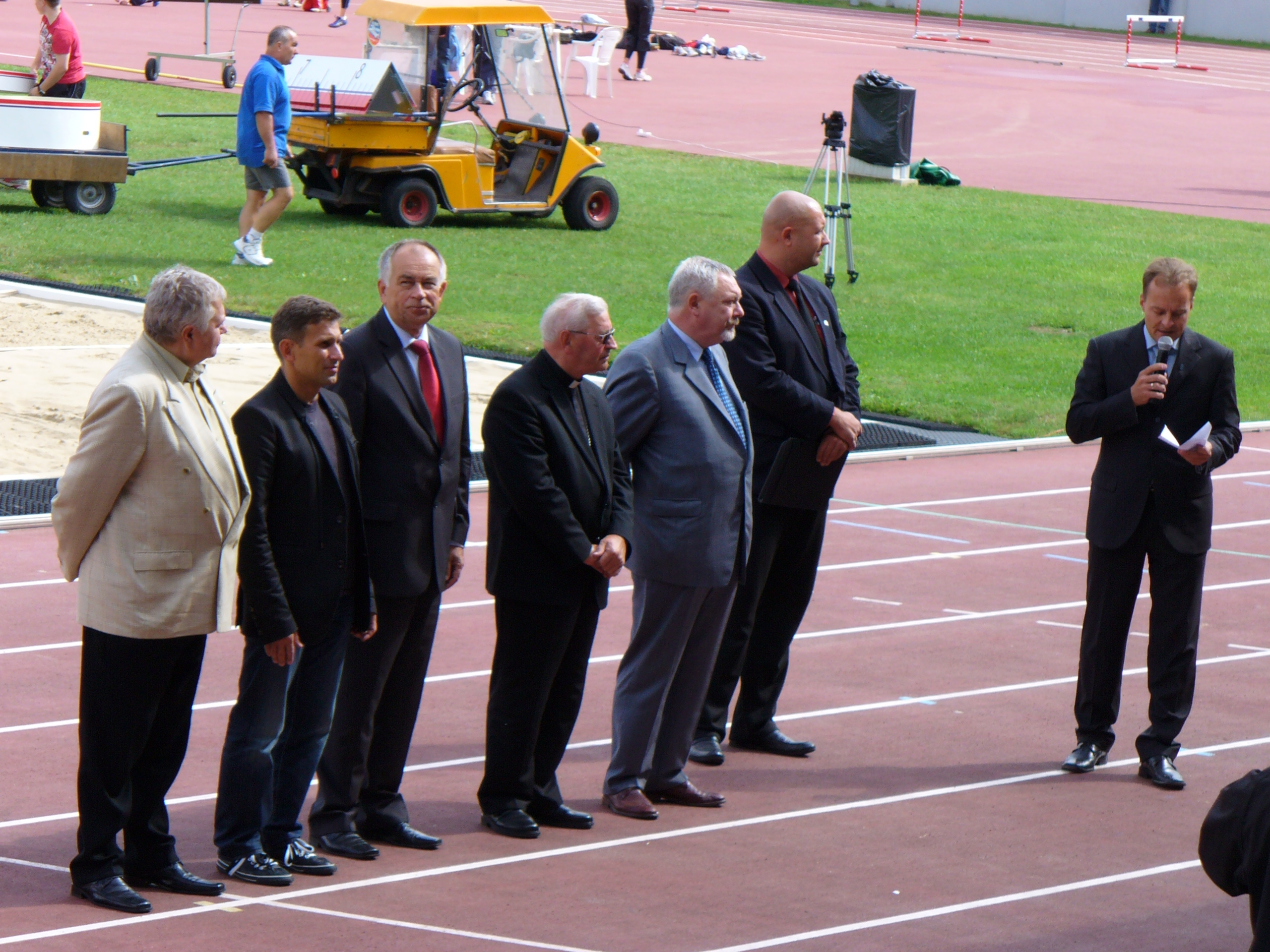 Honorowy Komitet Drużynowych Mistrzostw Polski w lekkiej atletyce